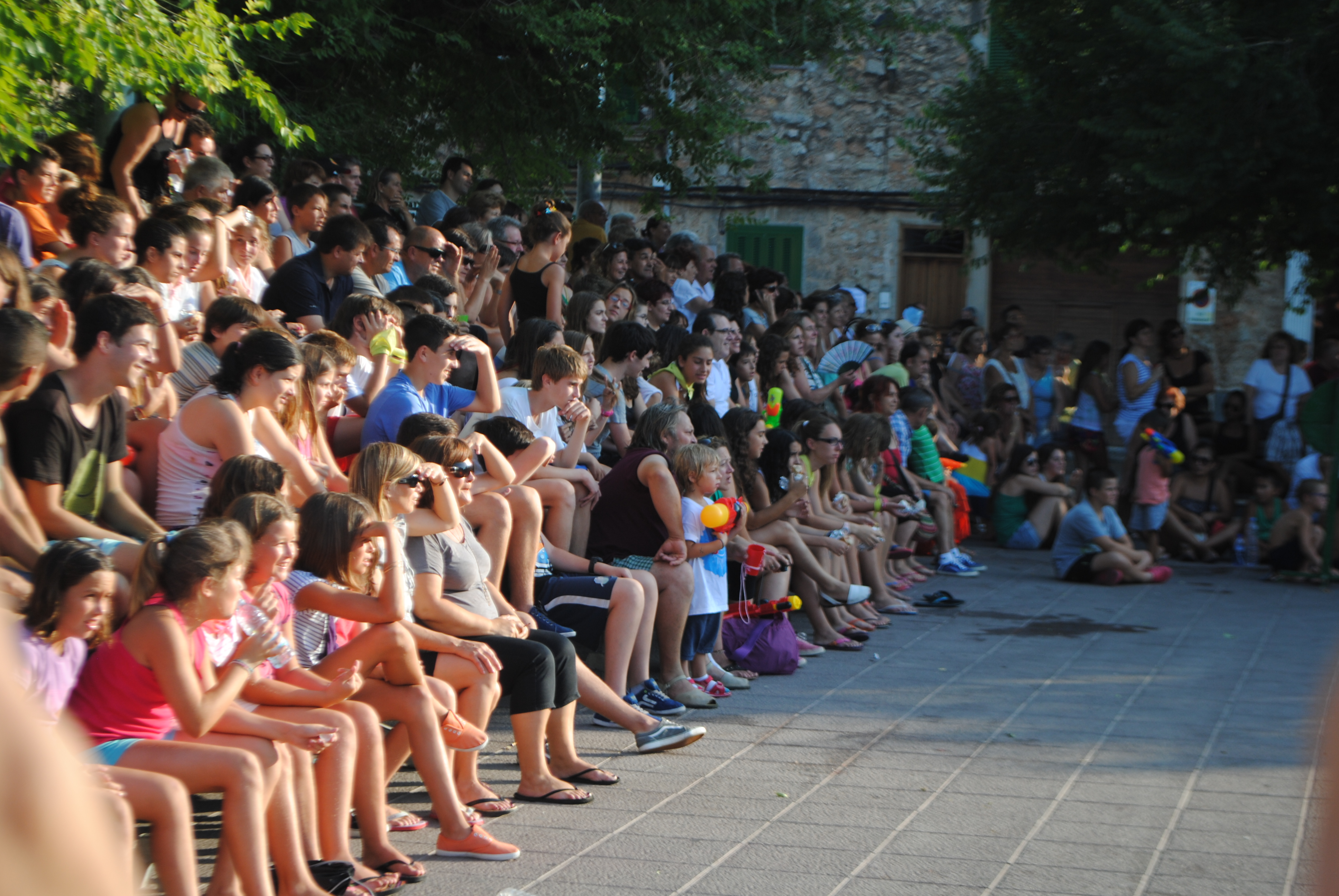 Imatge de les Festes Populars del 2013 a Santa Maria del Camí